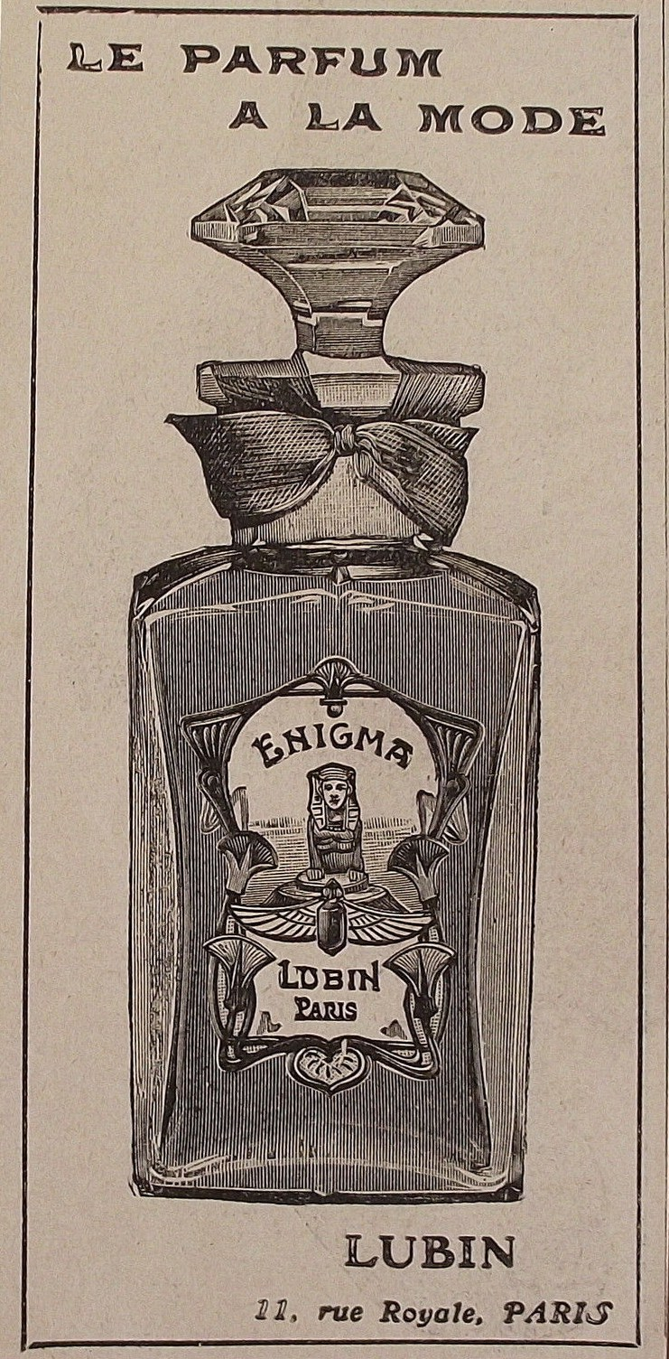 Publicité pour Enigma de Lubin (Paris) parue en 1900 dans un périodique.